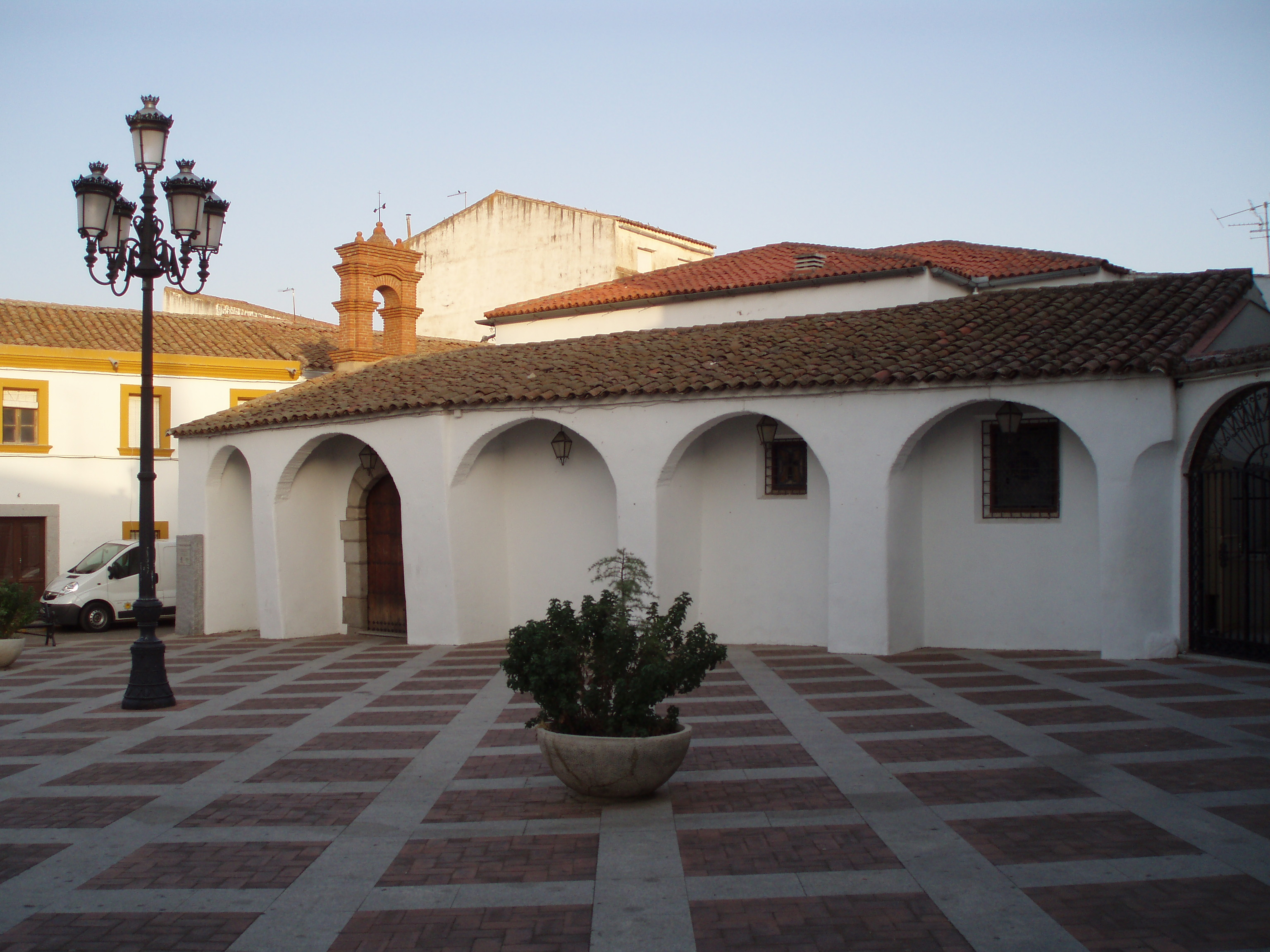 Vista lateral de la Ermita de Santa Ana, la primera iglesia, de Hinojosa del Duque (Córdoba) (Andalucía) (España)